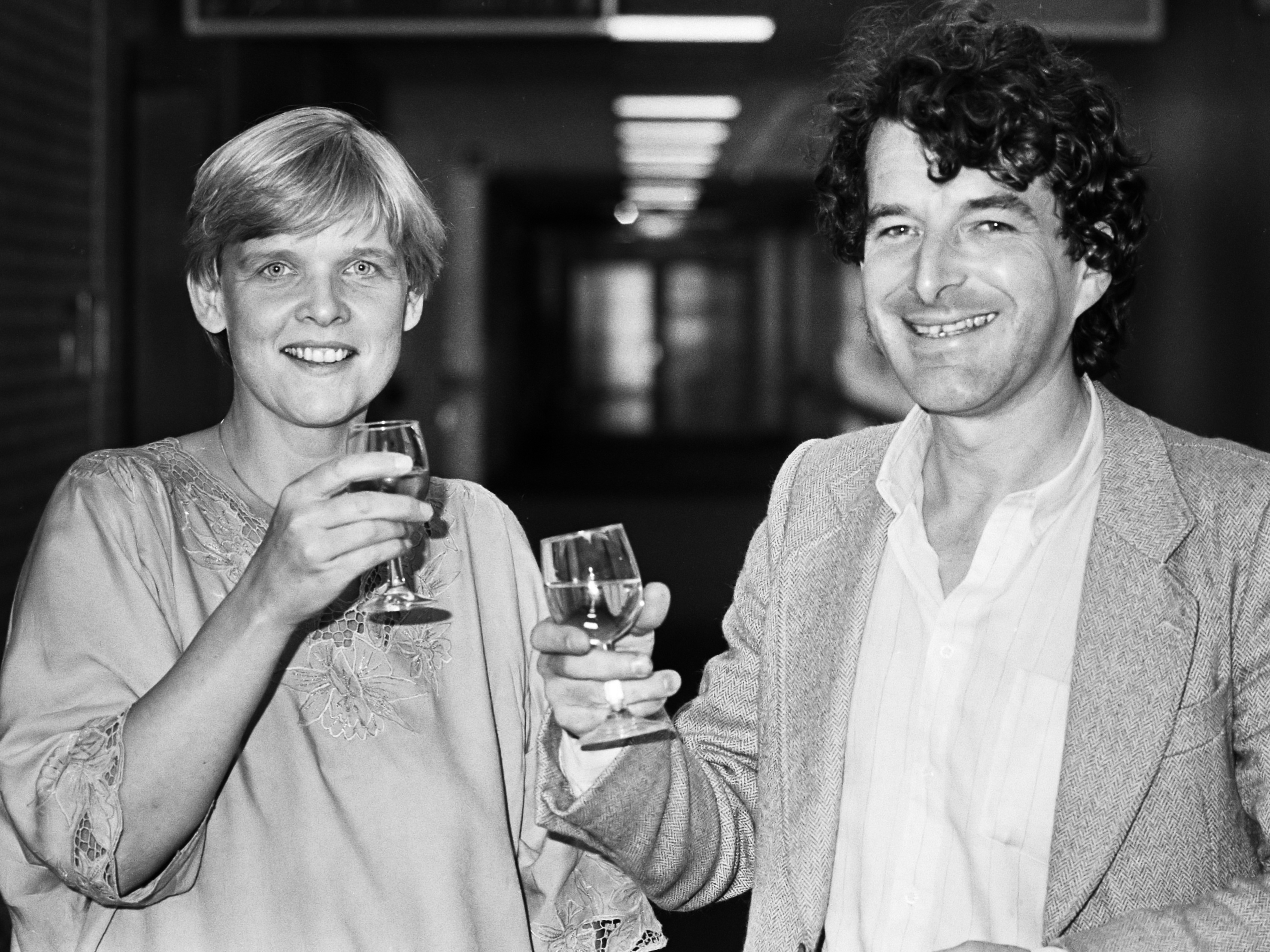 Winnares van de Gouden Griffel en winnaar van de Gouden Penseel; Nannie Kuiper en Joost Roelfsz 27 september 1982